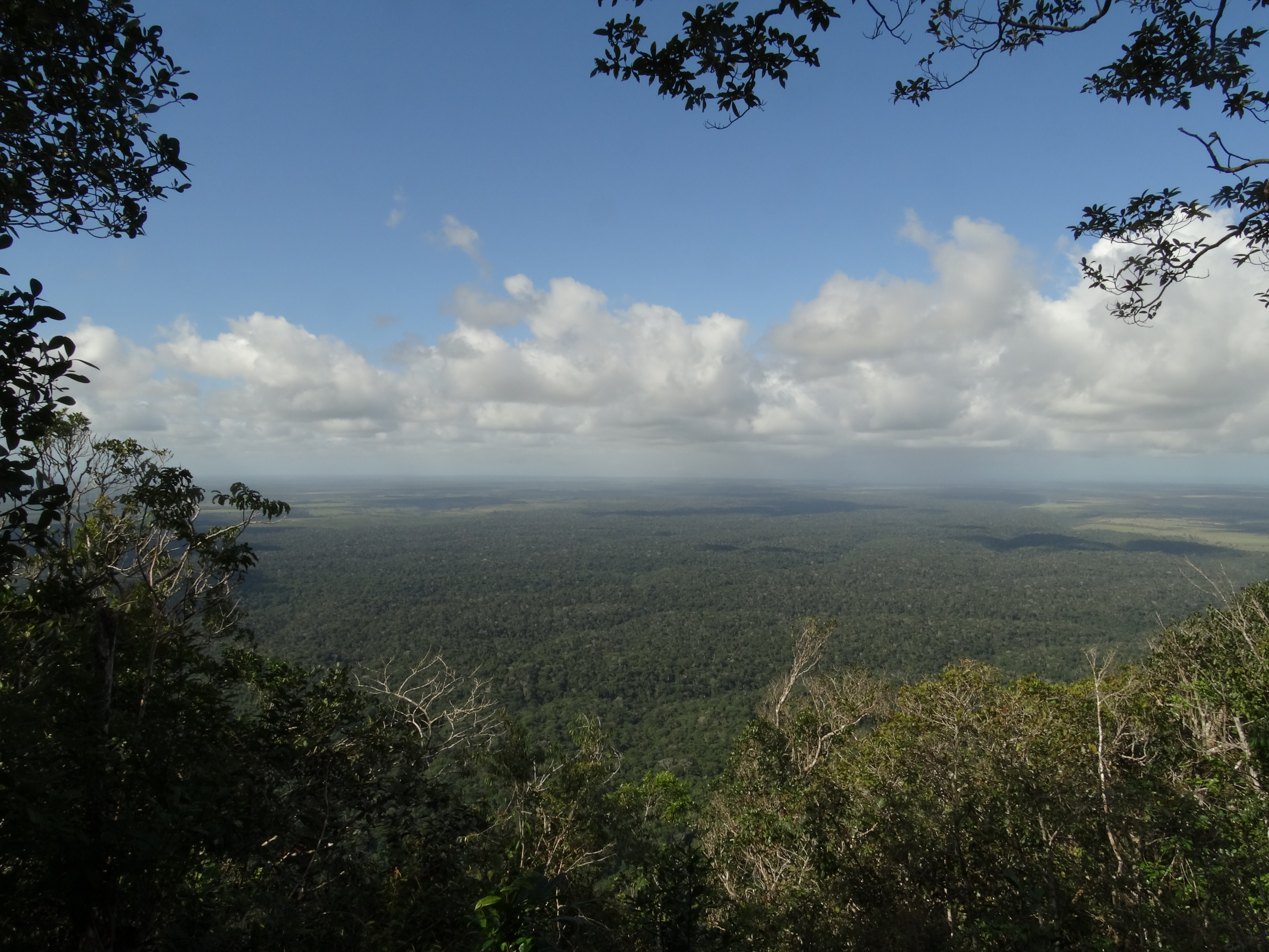 Foto feita no final da trilha em direção ao mar, após 1.700 metros de caminhada e 536 metros de altitude, no topo do Monte Pascoal.